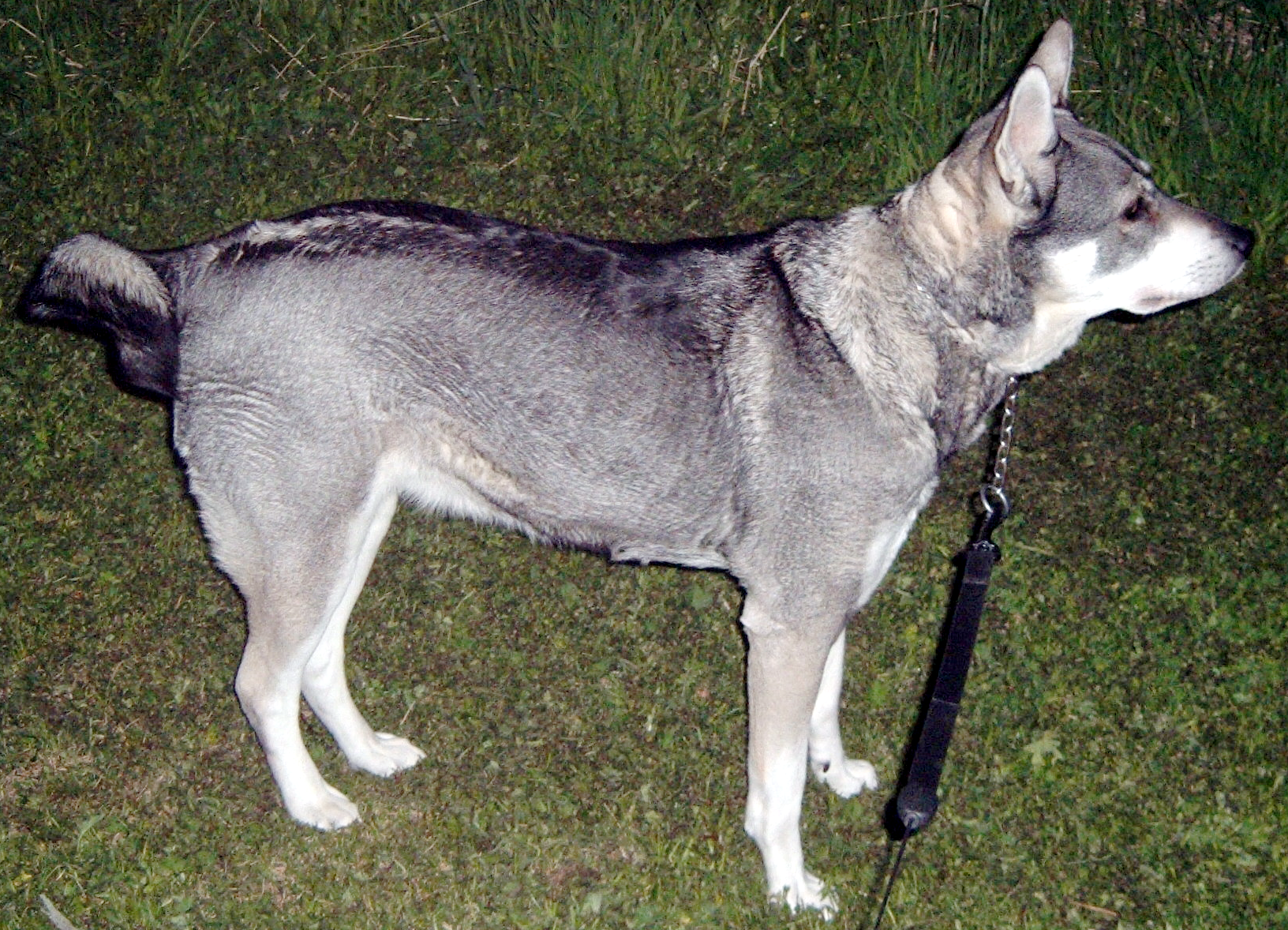 Jämthund